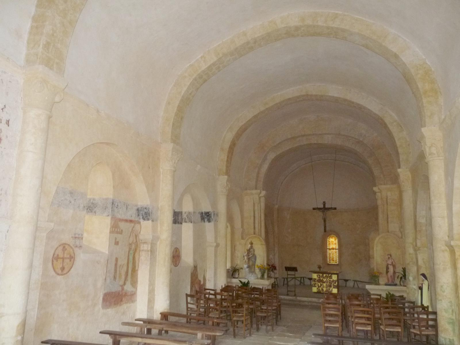 église de Coulgens, Charente, France